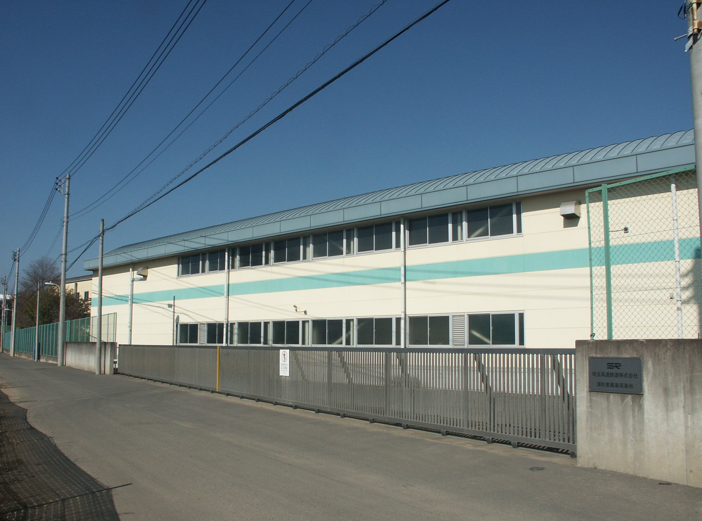 埼玉高速鉄道浦和美園車両基地